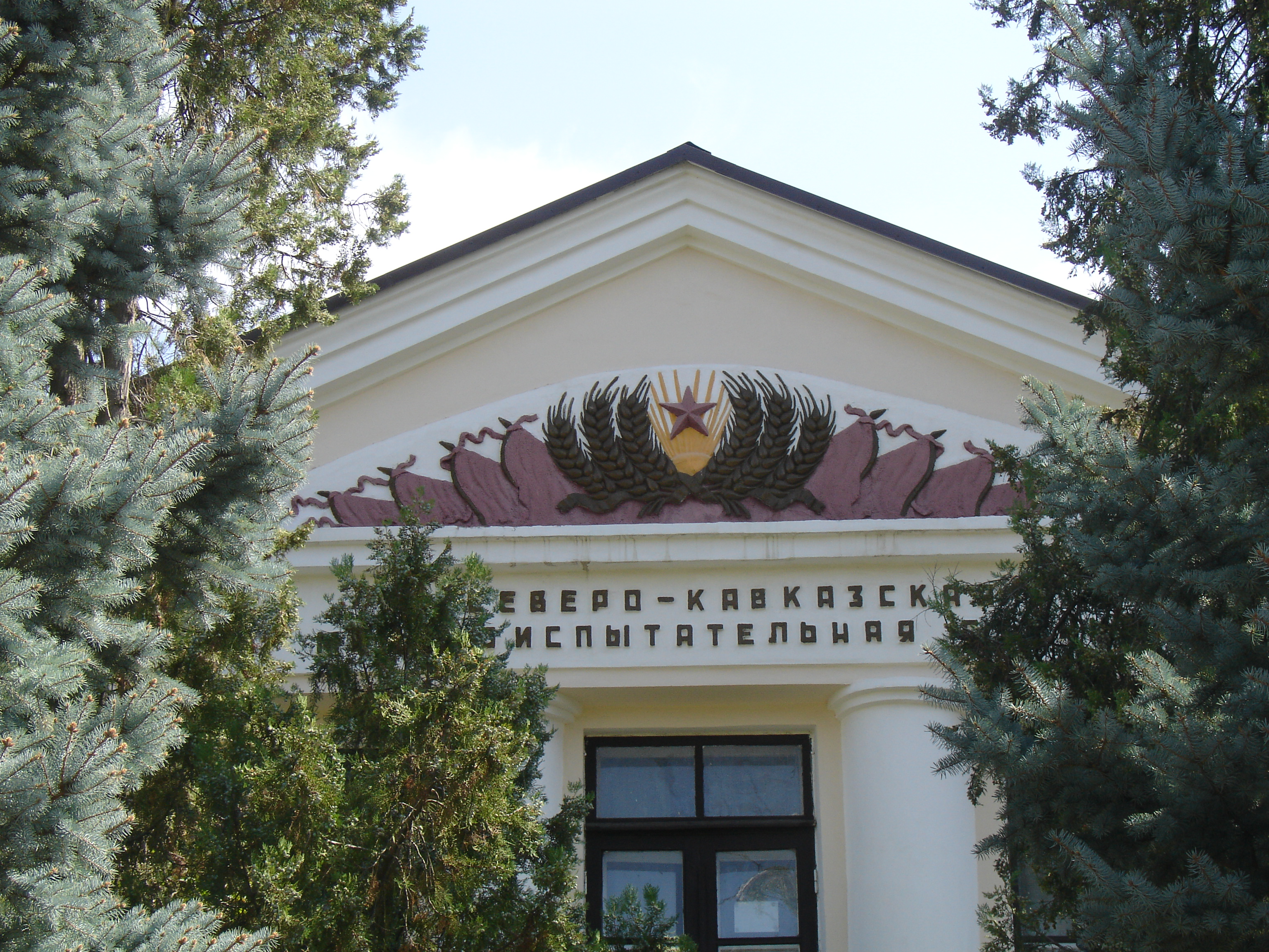 Северо-Кавказская машиноиспытательная станция (фронтон здания с гербом и названием). Зерноград, Ростовская обл., Россия.